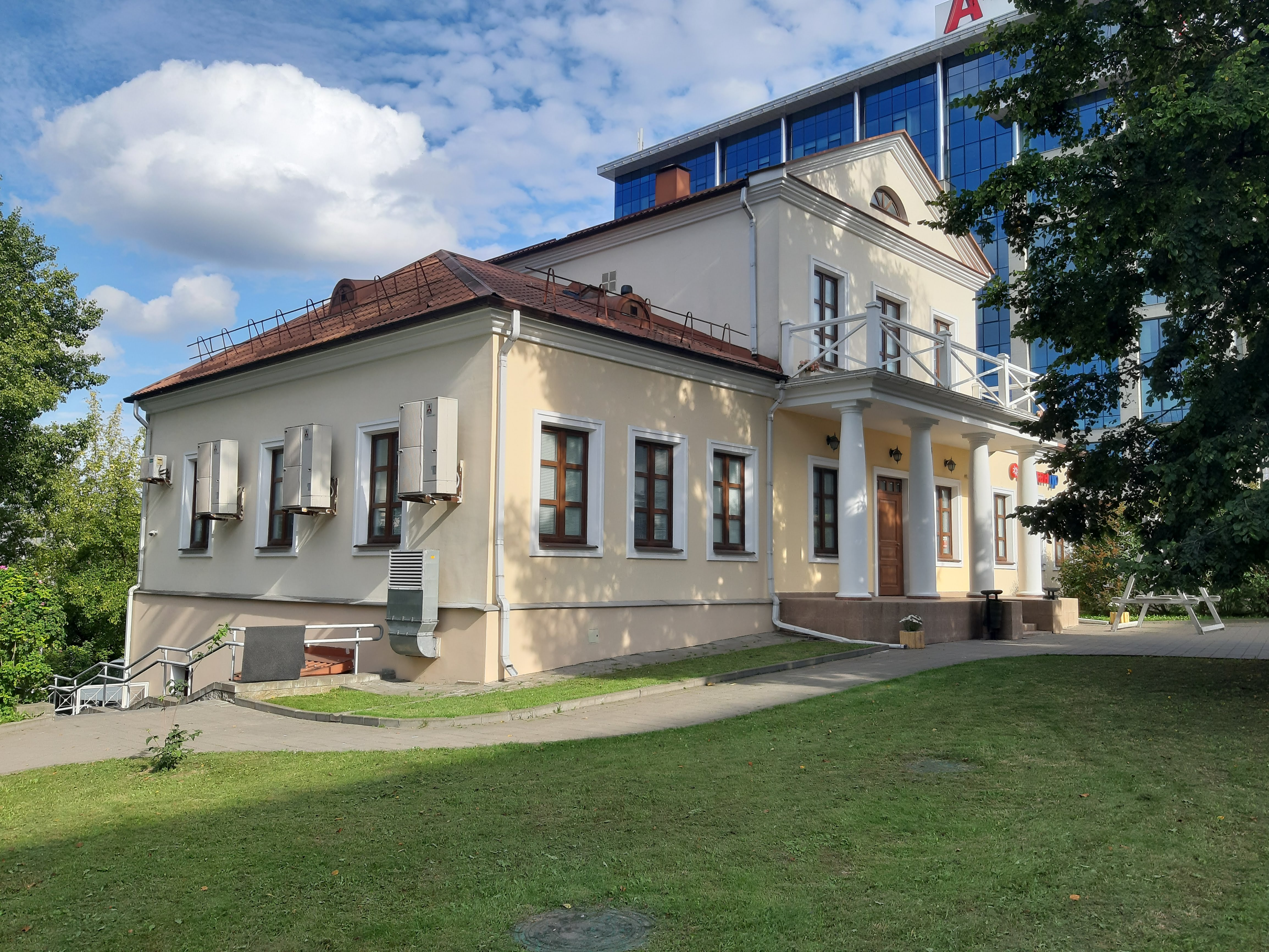 Мінск. Верхні горад (жнівень 2019)